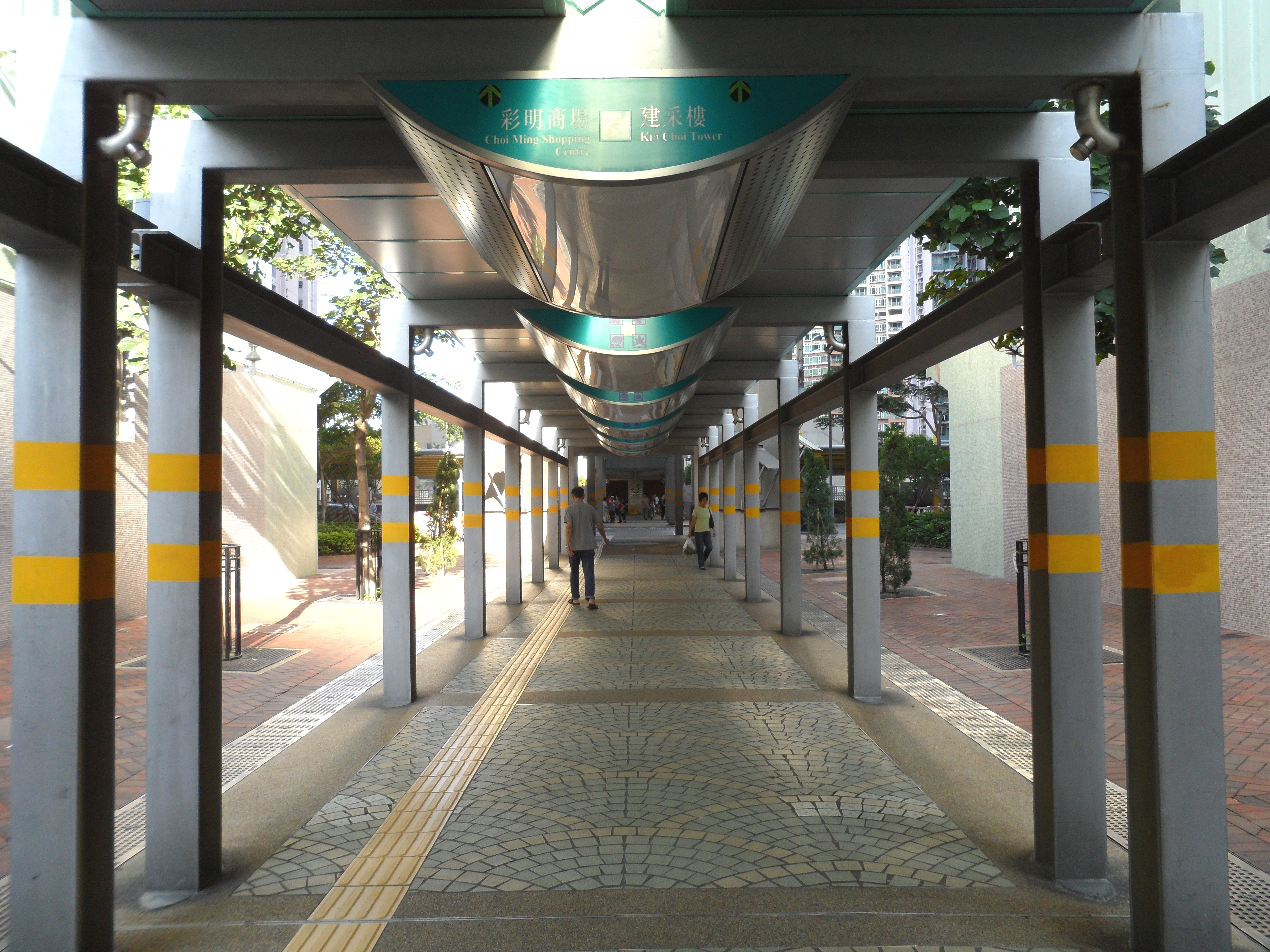 建采鐘樓行人通道